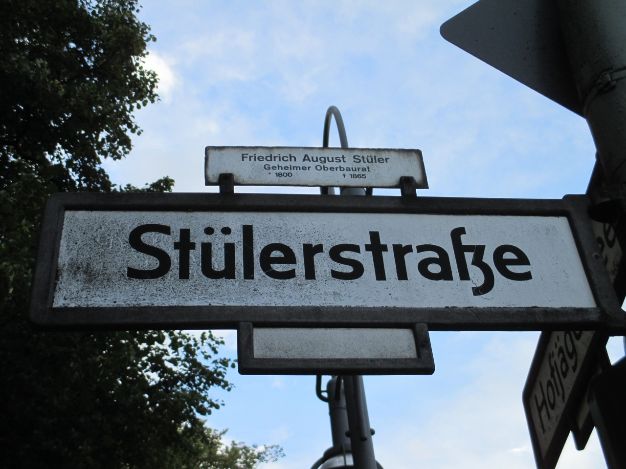 Berliner Straßenschild der Stülerstraße mit Widmung